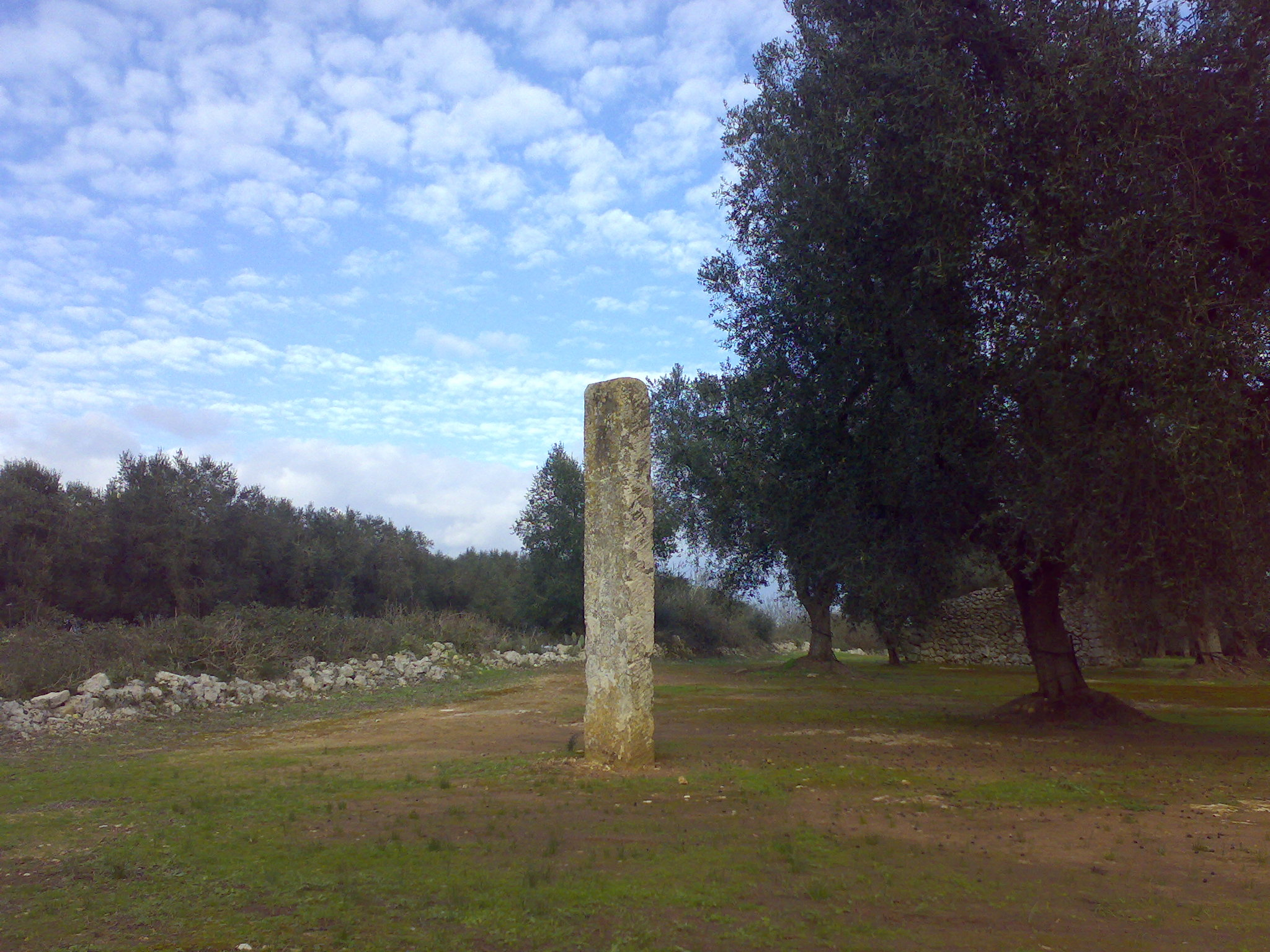 Menhir Spruno Maglie, provincia di Lecce